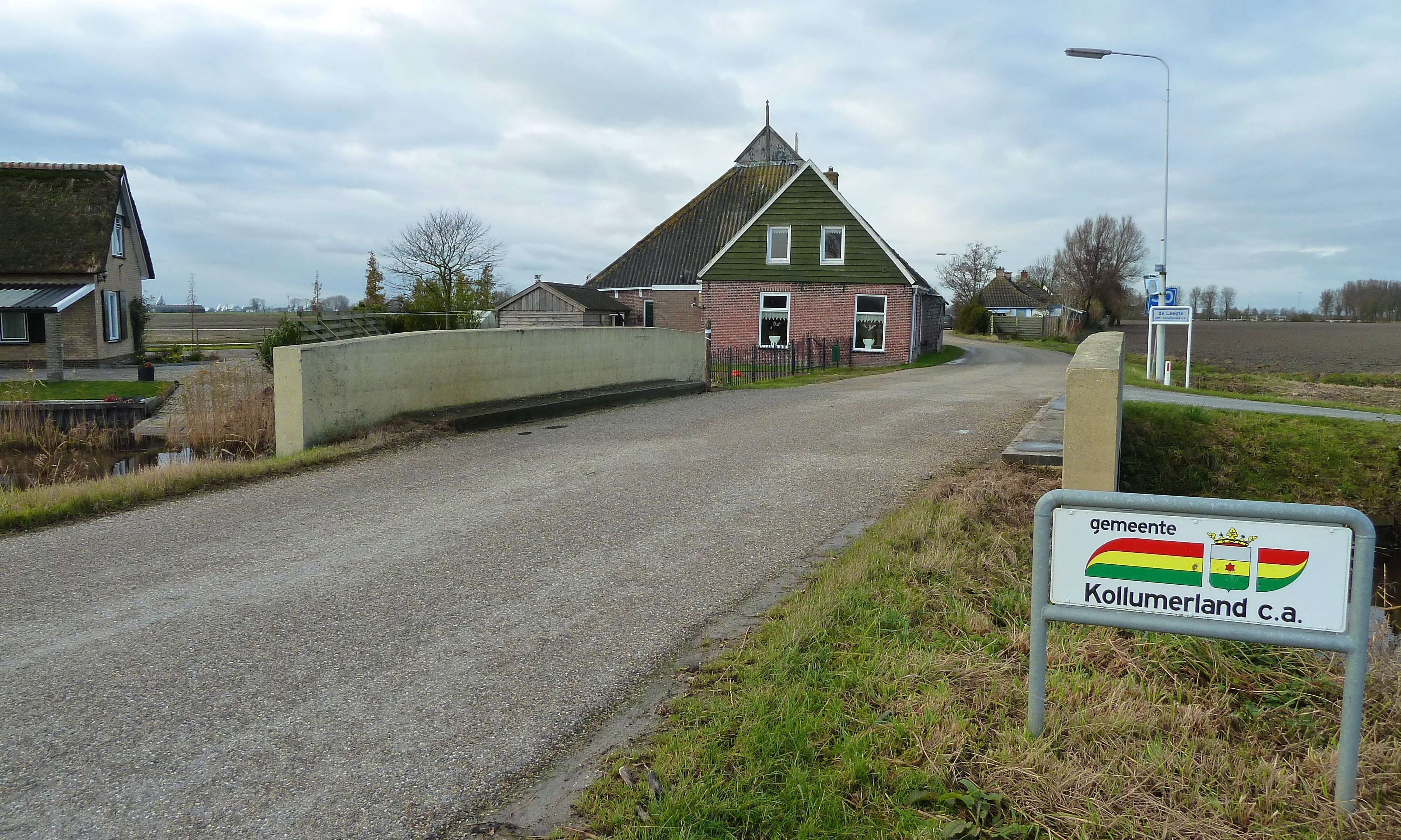 Het buurtschap De Leegte in de Friese gemeente Kollumerland en Nieuwkruisland, gezien vanaf de richting Pieterzijl.